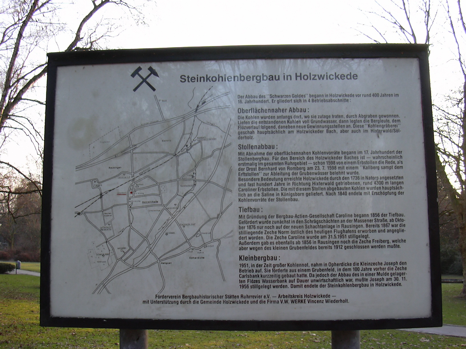 Infotafel des Bergbaurundwegs Holzwickede, Steinkohlenbergbau in Holzwickede (Station 1, Übersichtstafel)